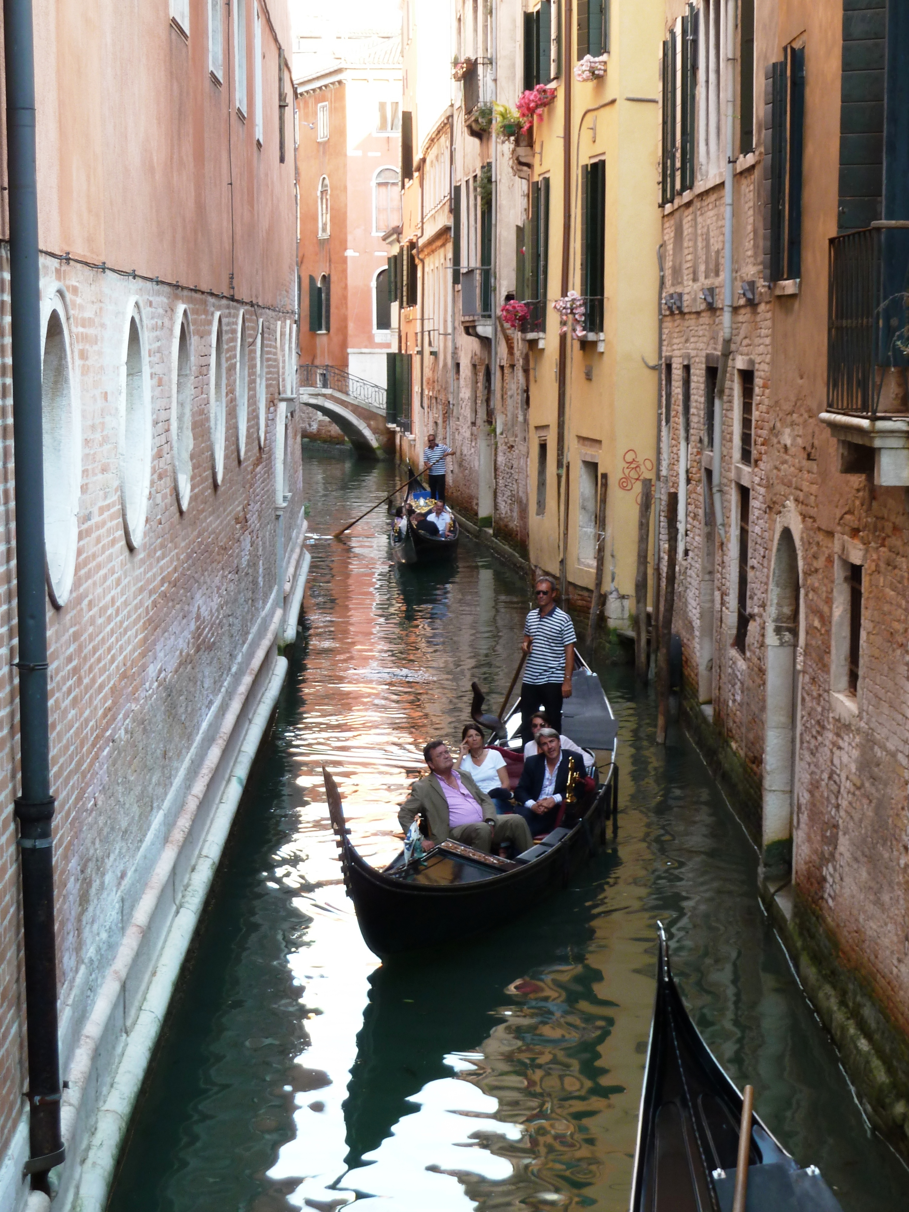 Rio di San Salvador (Venice)